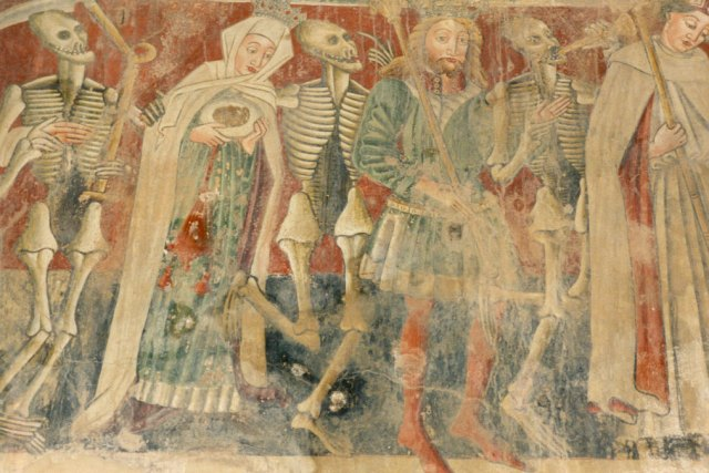 Totentanz in Beram